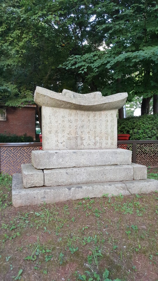 취병조형유허비